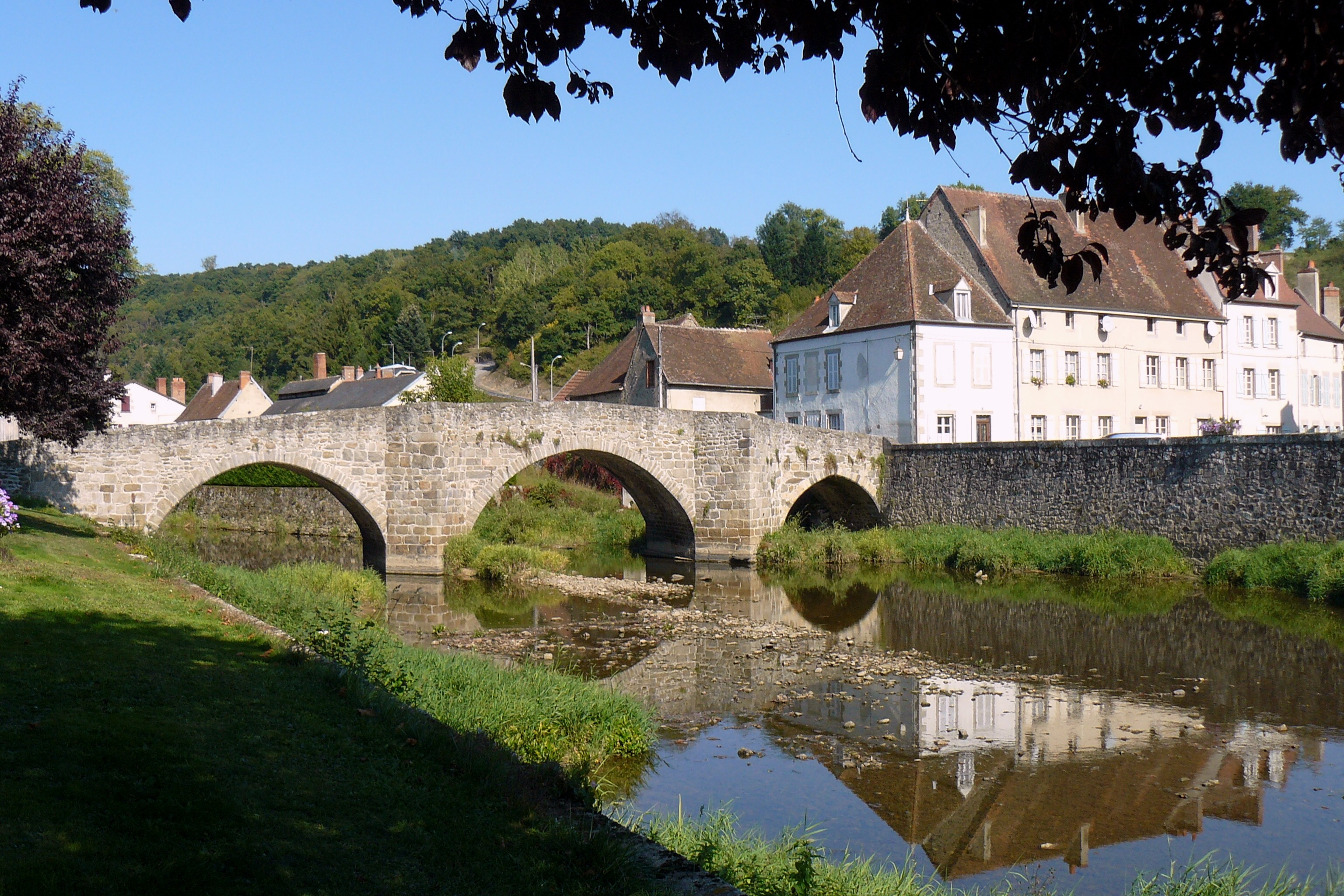 Pont roman à Chambon-sur-Voueize (Creuse, France)